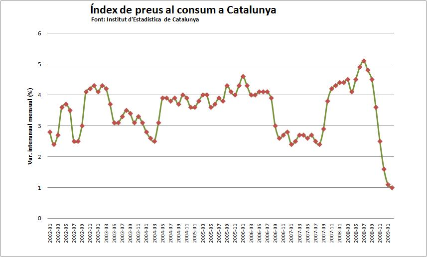 IPC Catalunya